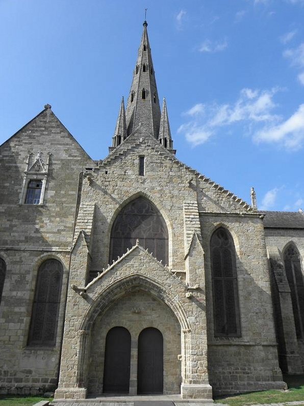 Porche au Duc de la basilique Notre-Dame de Bon-Secours de Guingamp (22). .